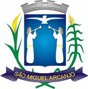 Brasão sma